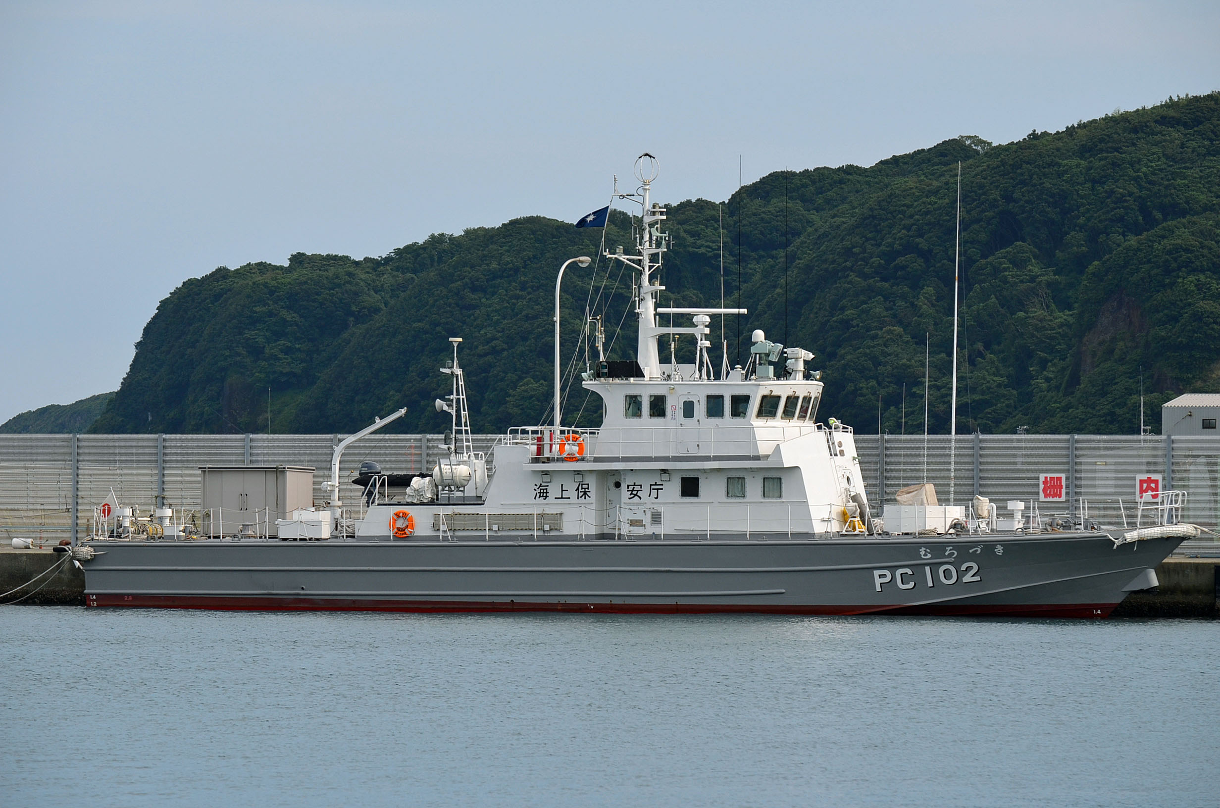 PC102巡視艇むろづき（串本）